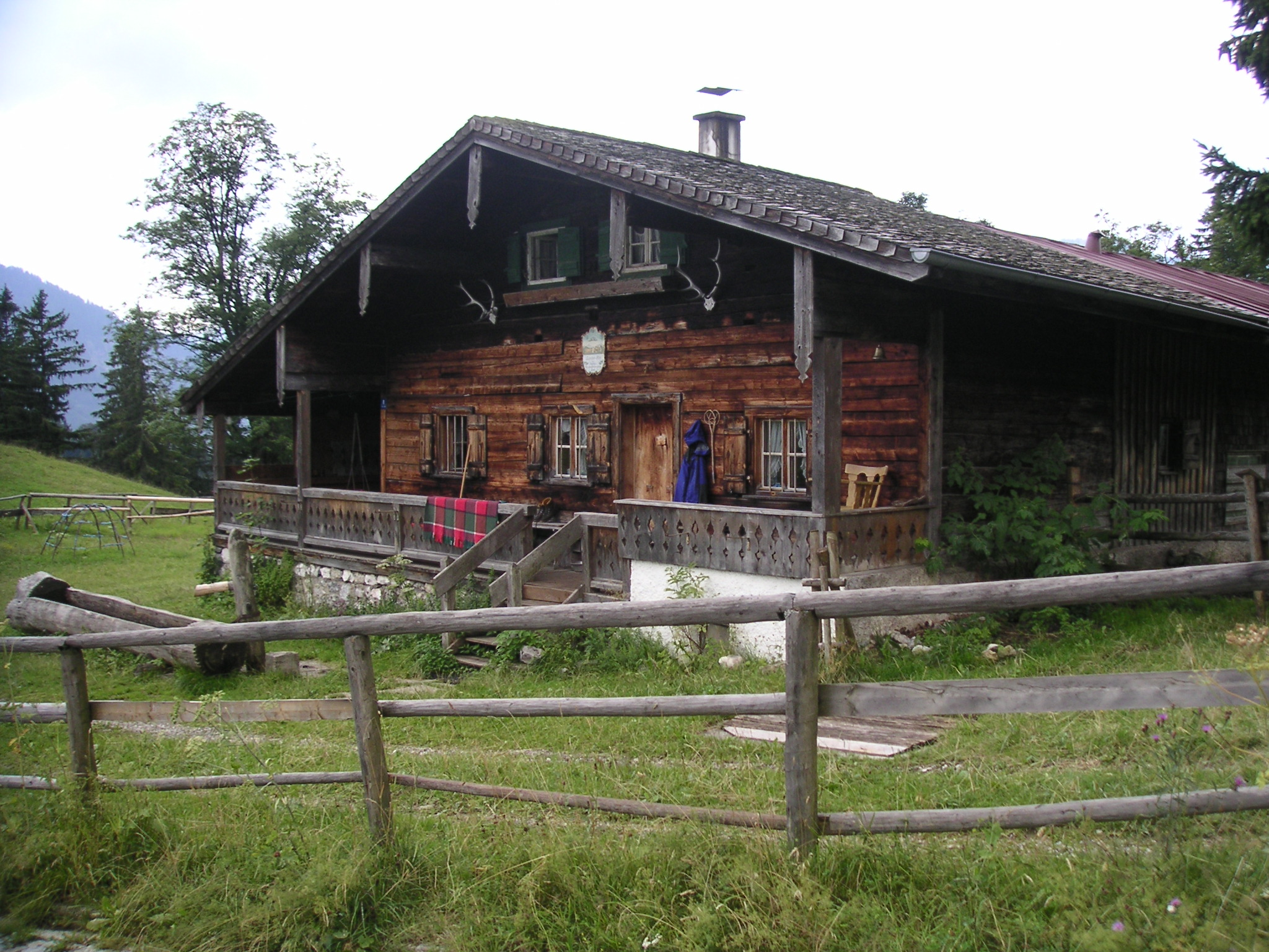 Larcher Alm beim SS - Berghaus auf dem Sudelfeld